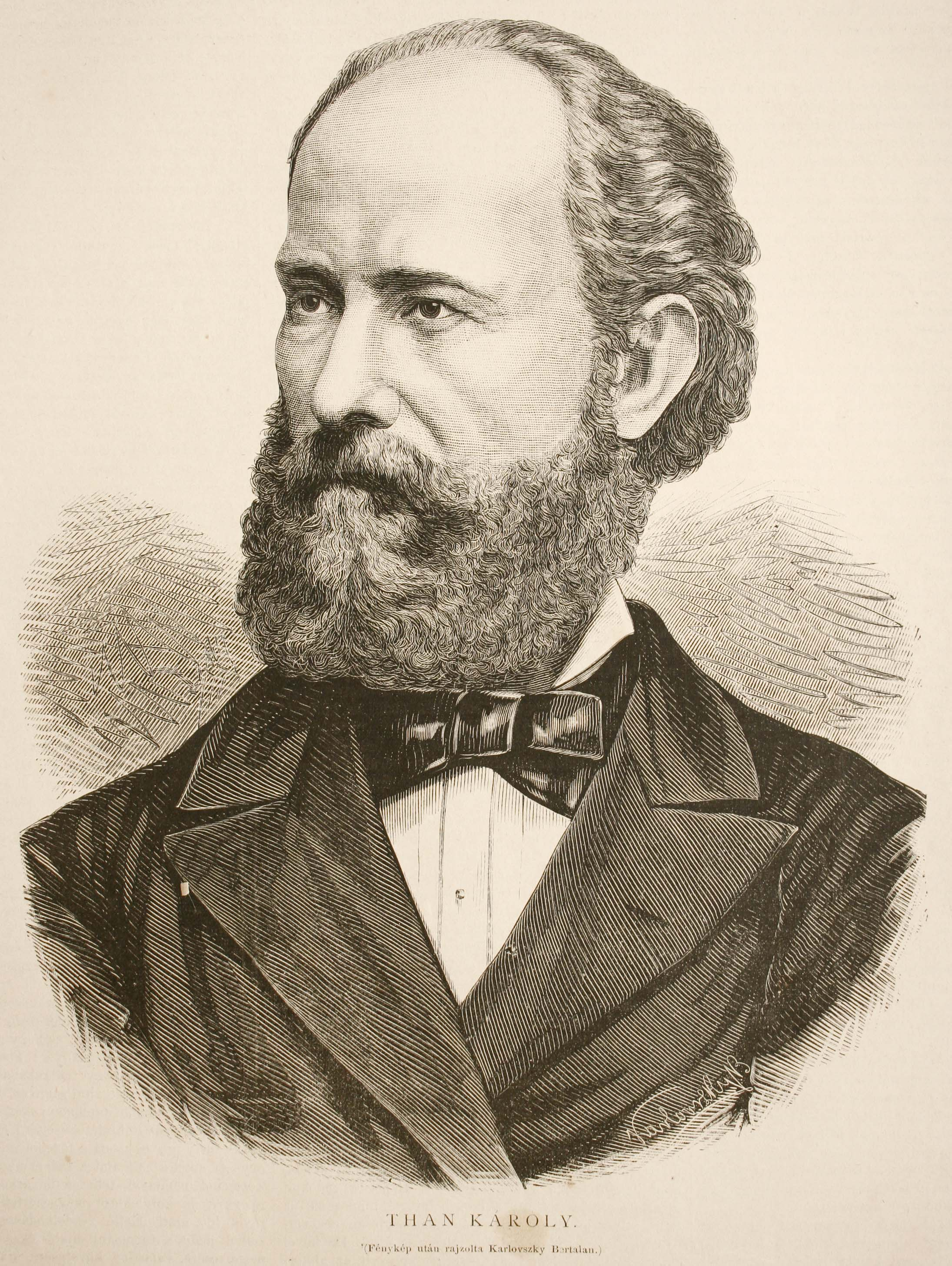 Than Károly arcképe. Ország Világ c. folyóirat 1880, scan: user szerkesztő Takkk